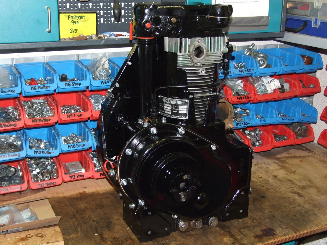 HATZ-Diesel Motor E89FG